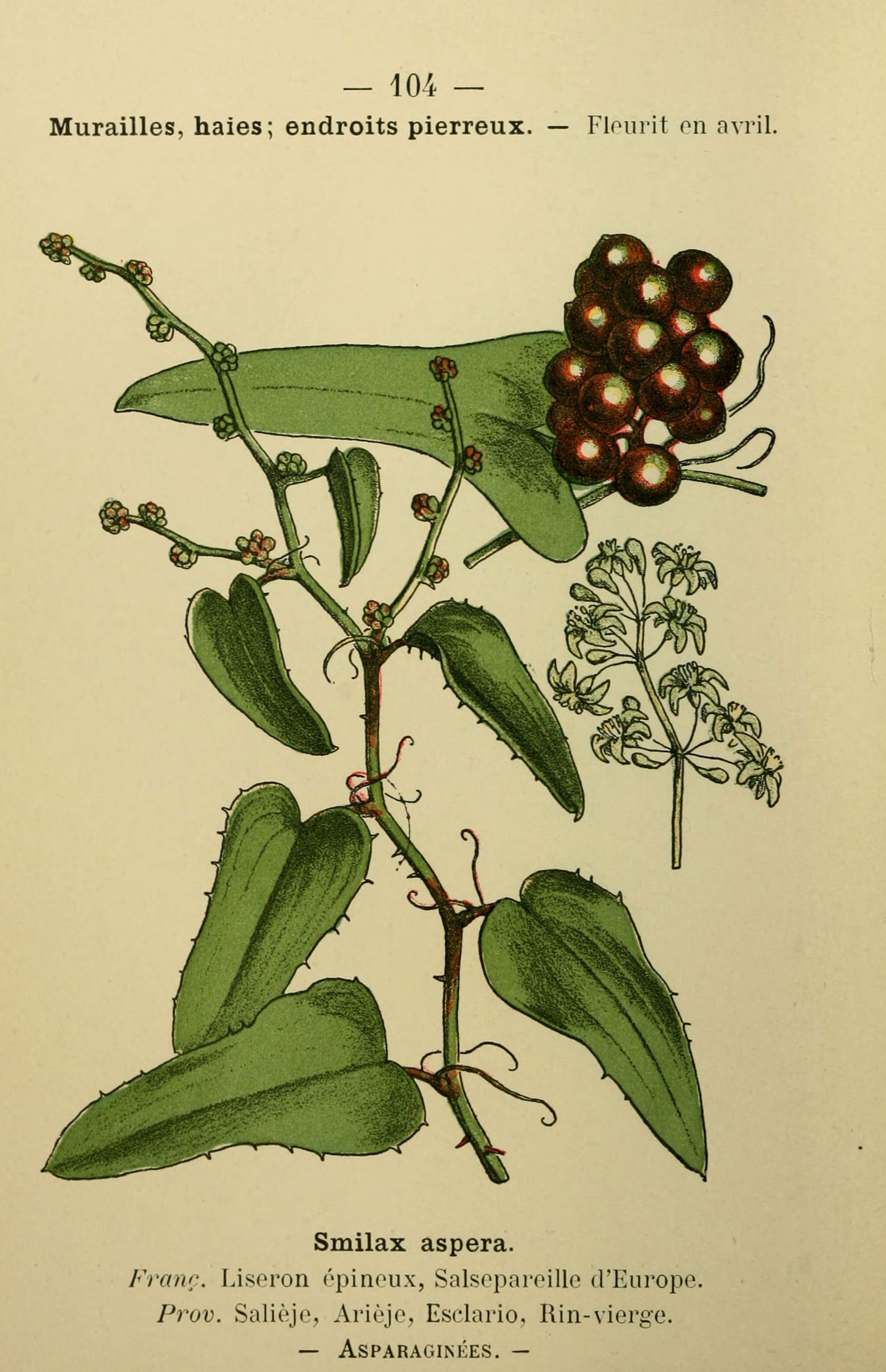 — 404 — Murailles, haies; endroits pierreux. — Flourit on avril. Smilax aspera. Franc. Liseron épineux, Salsepareille d'Europe. Prov. Salièje, Arièje, Esclario, Rin-vierge. — ASPARAGINÉES. —